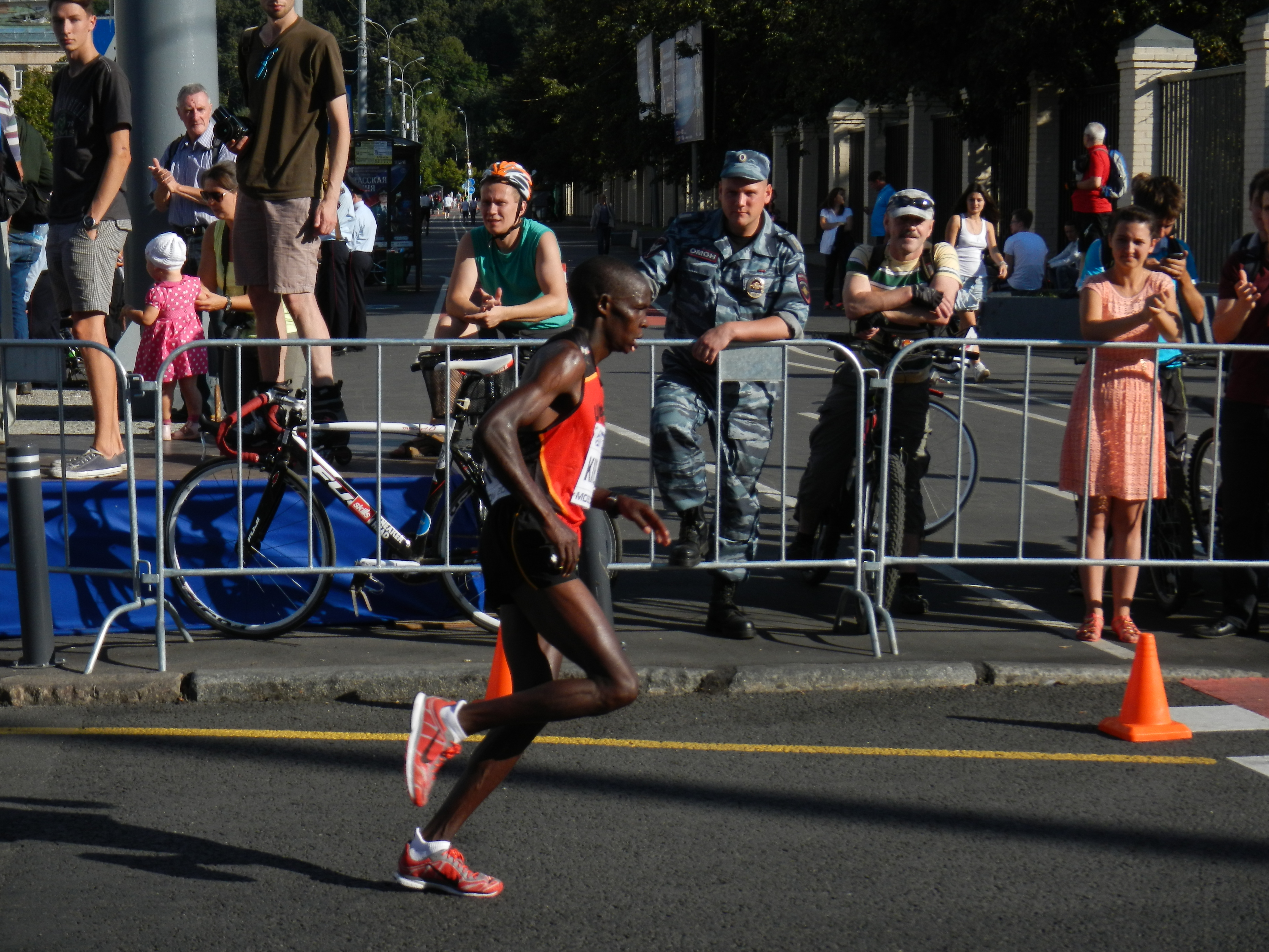 19 (1078) Abraham Kiplimo (Uganda) 2:16:25